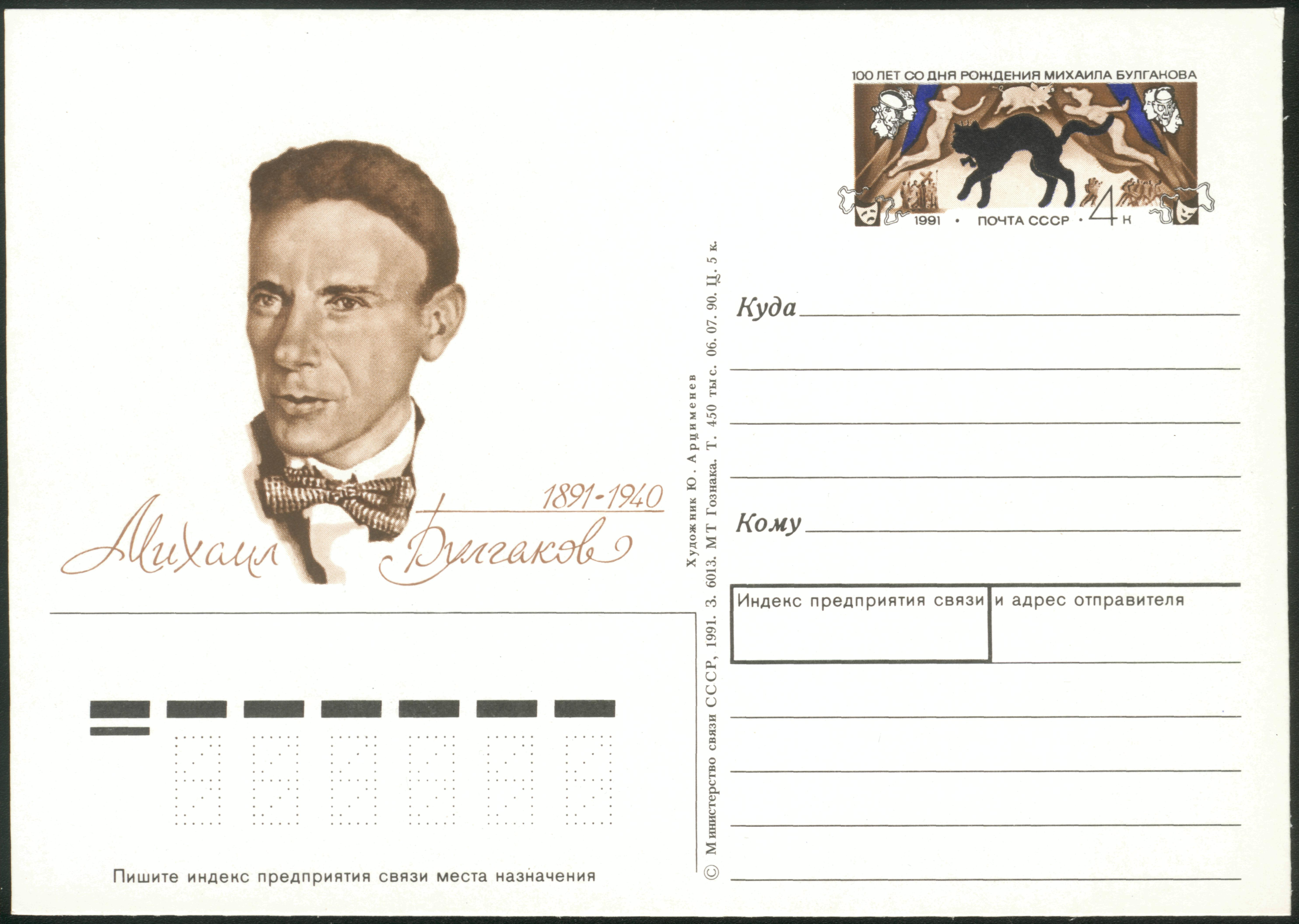 M.Bulgakov. USSR original stamp 1991 Михаил Булгаков. Односторонняя почтовая карточка СССР с оригинальной маркой. 1991 год. Дата подписания в печать - 6 июля 1990. Тираж 450 тысяч.